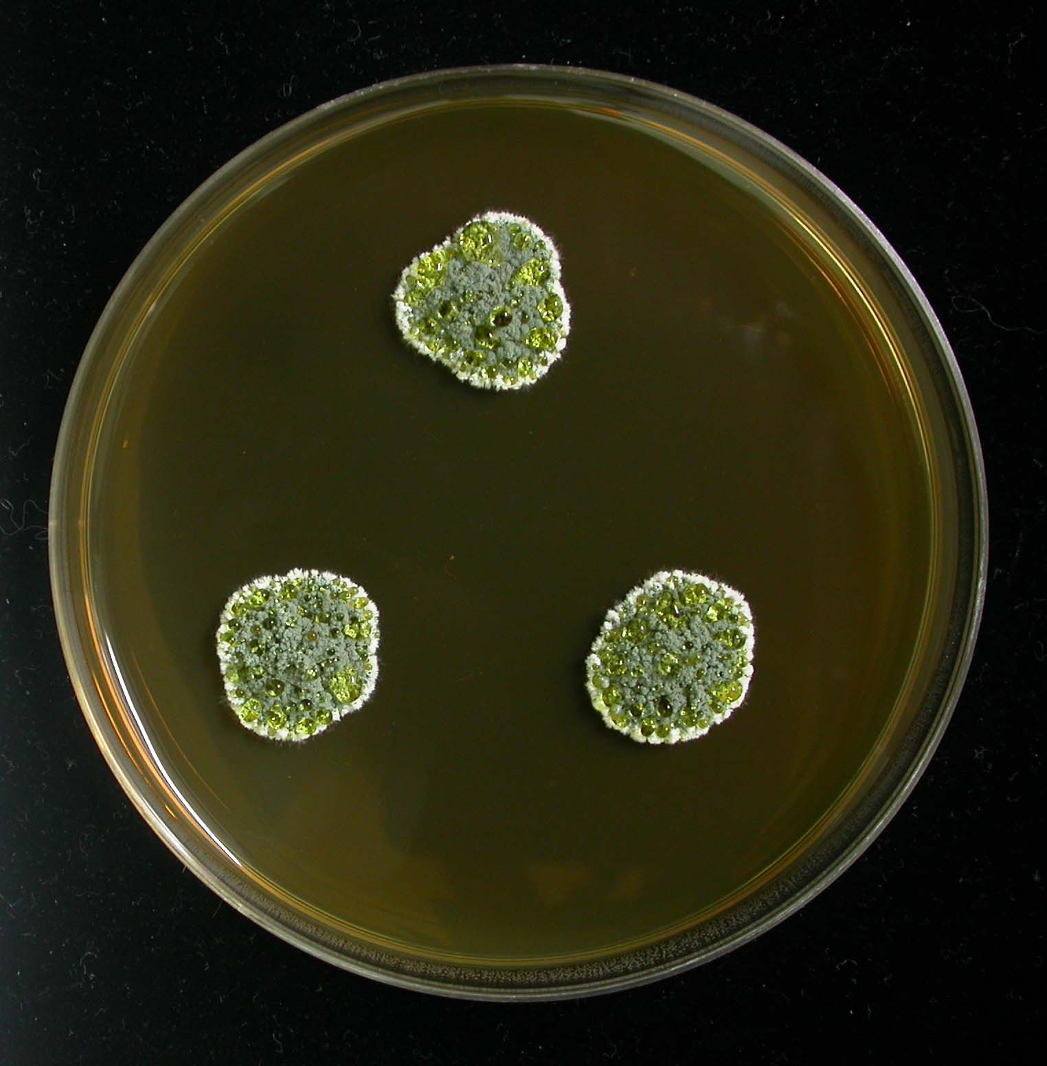 Penicillium glandicola ((Oudemans) Seifert & Samson) Location: penicillium glandicola on MEA medium